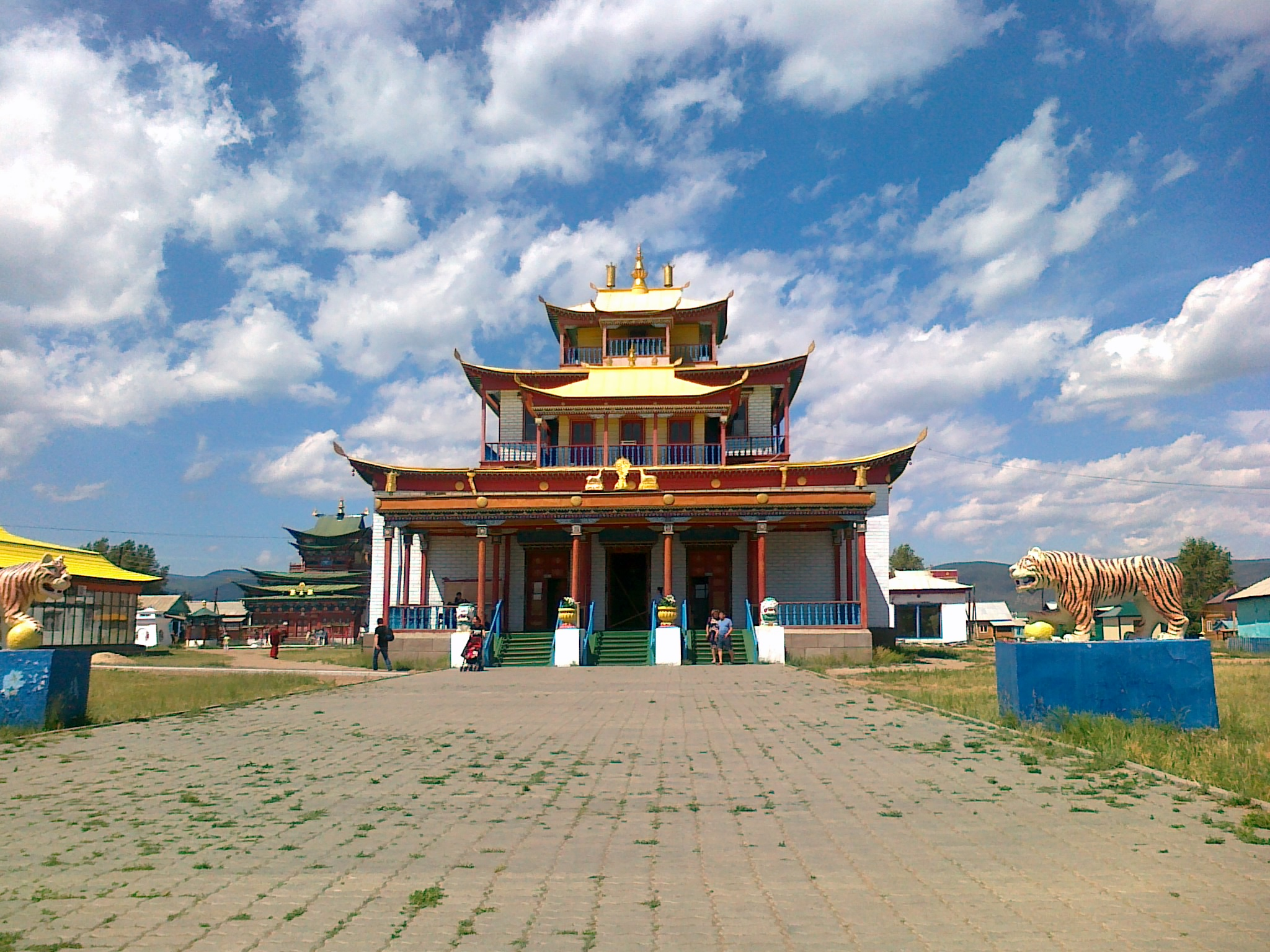 Tsogchen-dugan. The main cathedral church of the Ivolginsky datsan